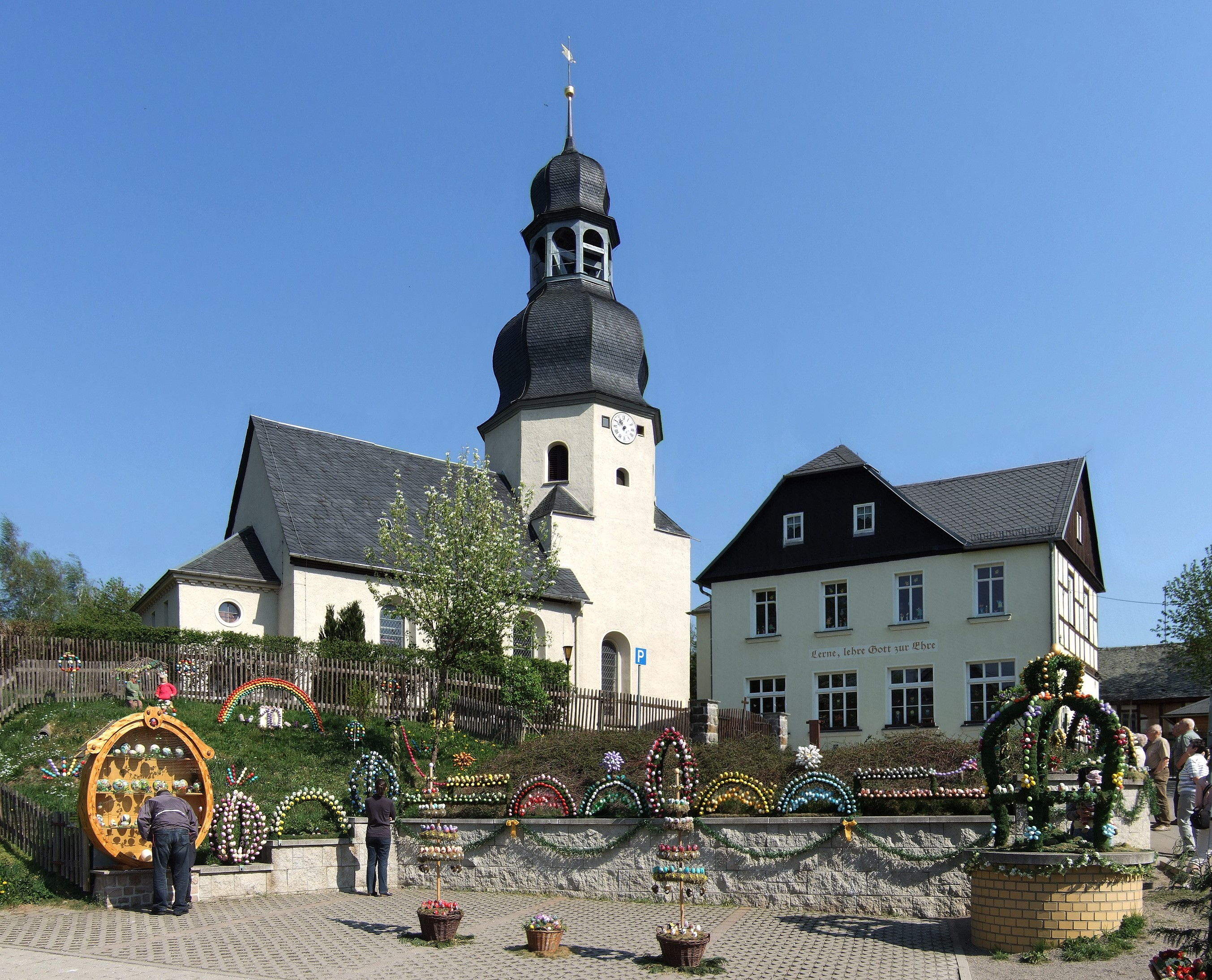 Osterbrunnen in Langenbernsdorf - OT Niederalbertsdorf in Sachsen/Germany